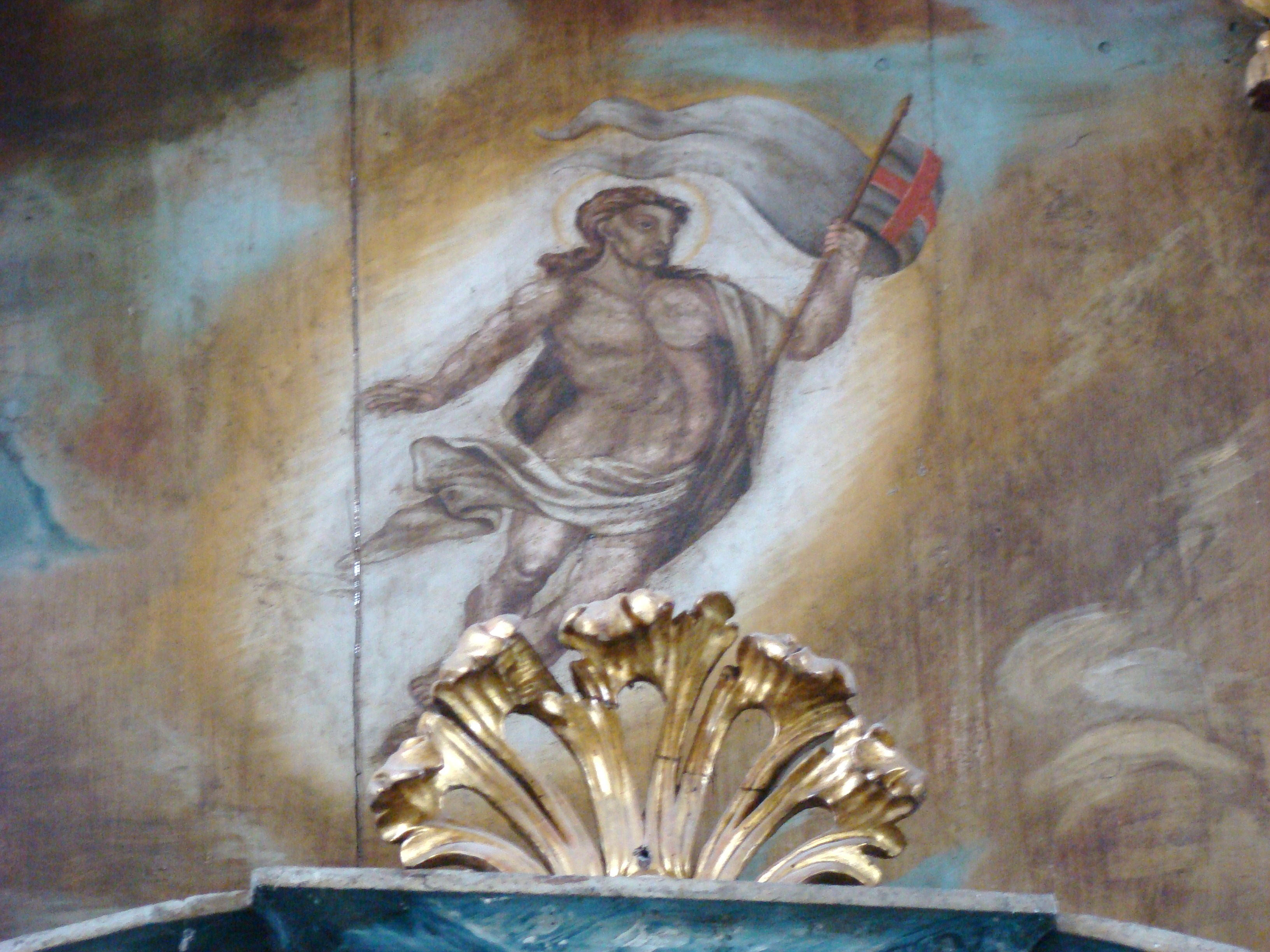 Biserica evanghelică, oraș Miercurea Sibiului, județul Sibiu 01